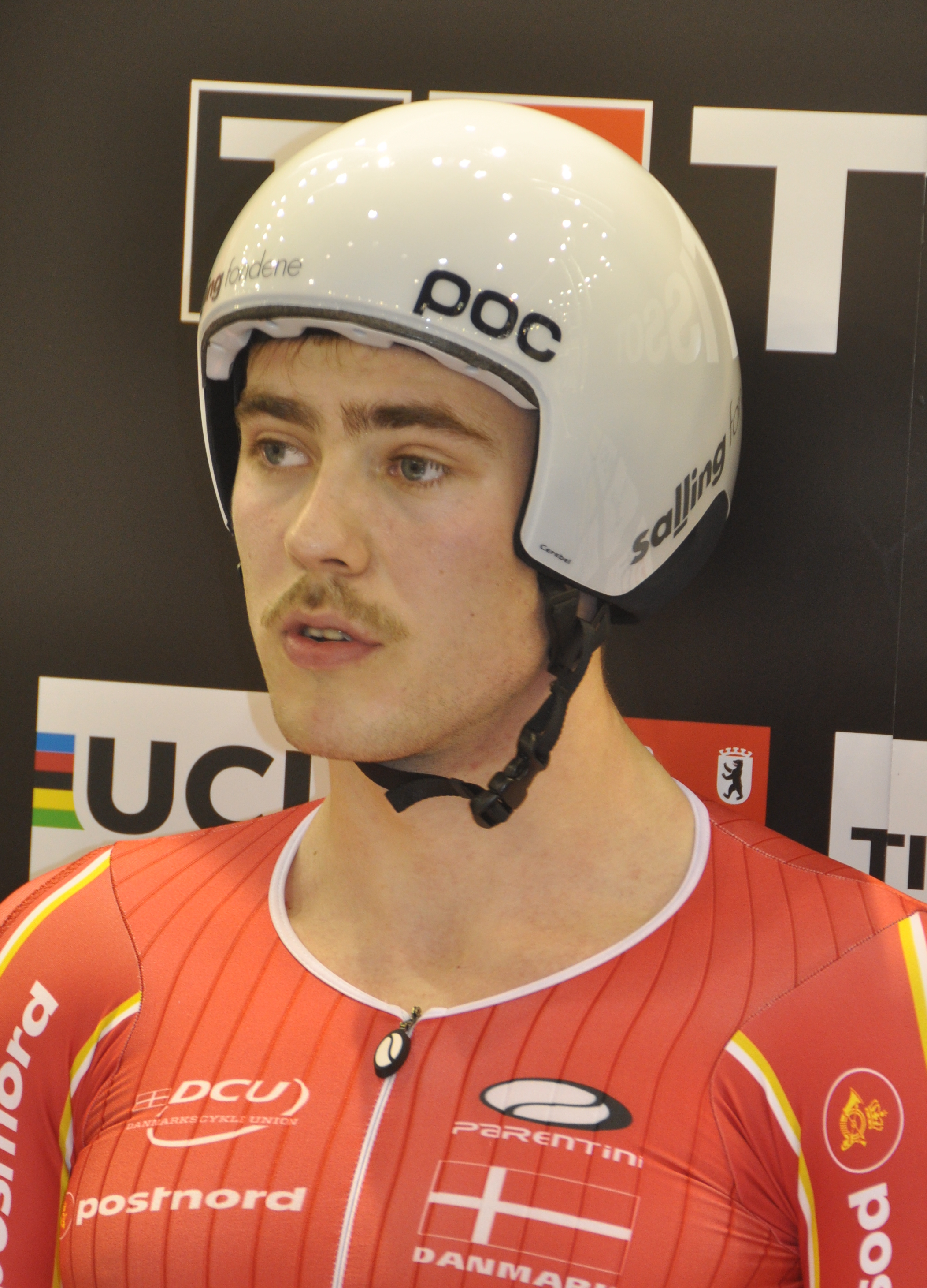 Rasmus Pedersen, dänischer Radsportler